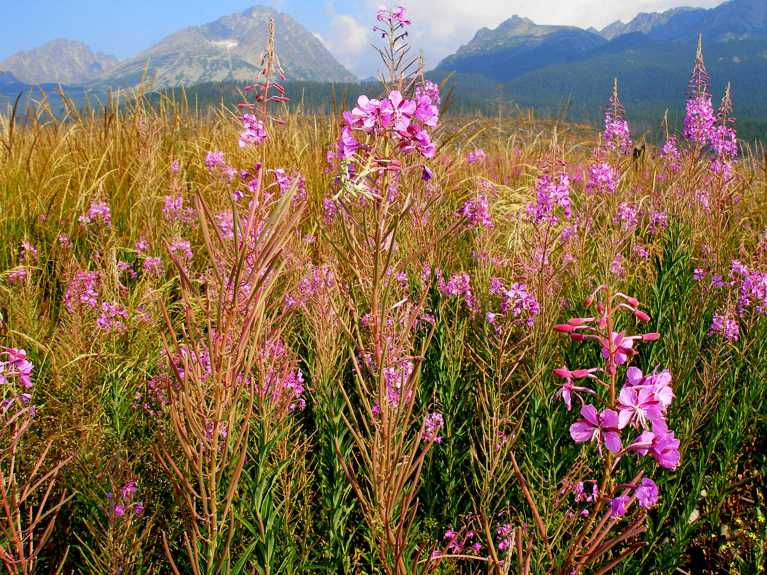 Vŕbka úzkolistá (Chamaenerium angustifolium). Kvety pri osade Tatranské Zruby, Slovakia